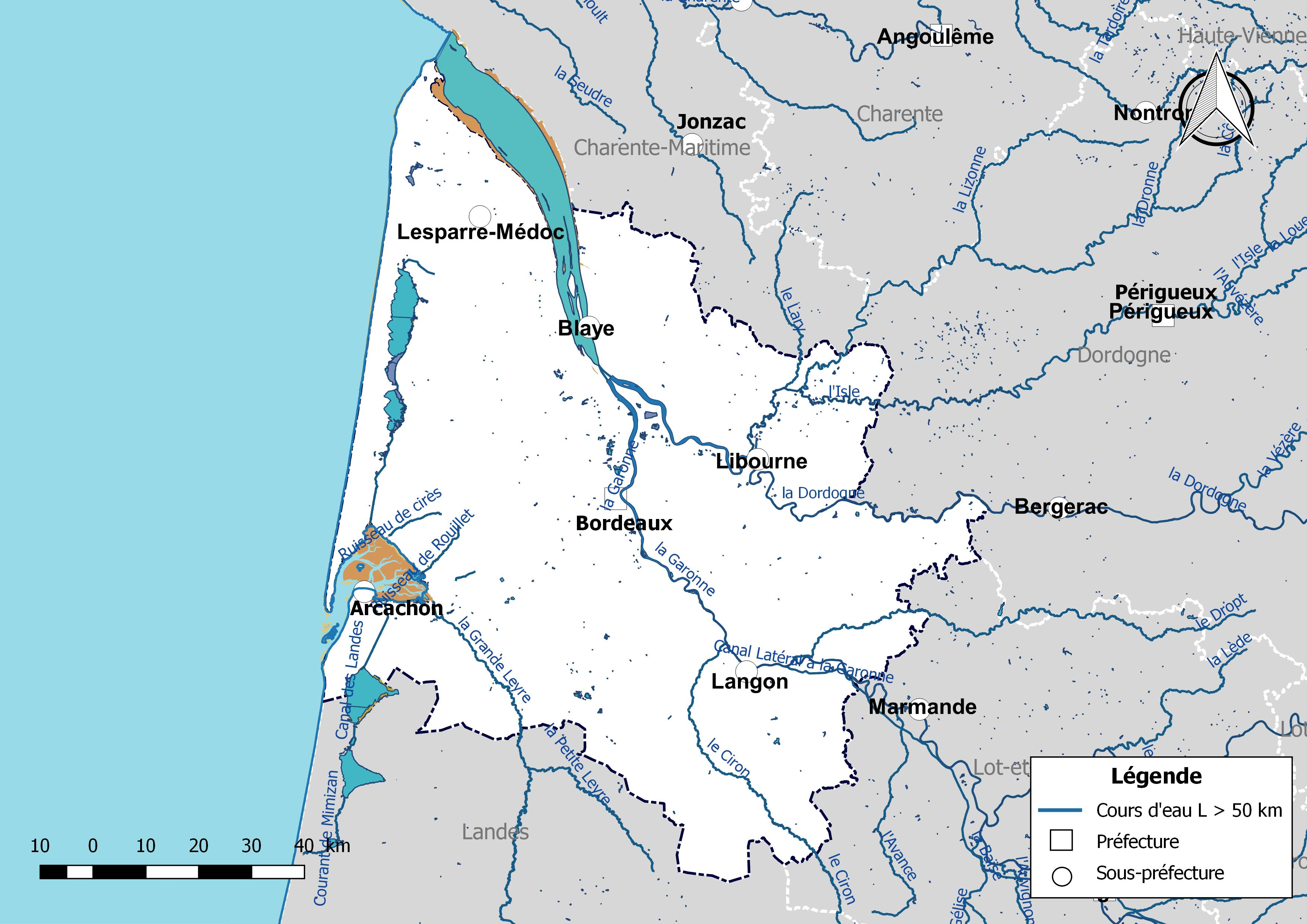 Carte des cours d'eau de longueur supérieure à 50 km drainant le département de la Gironde (France).